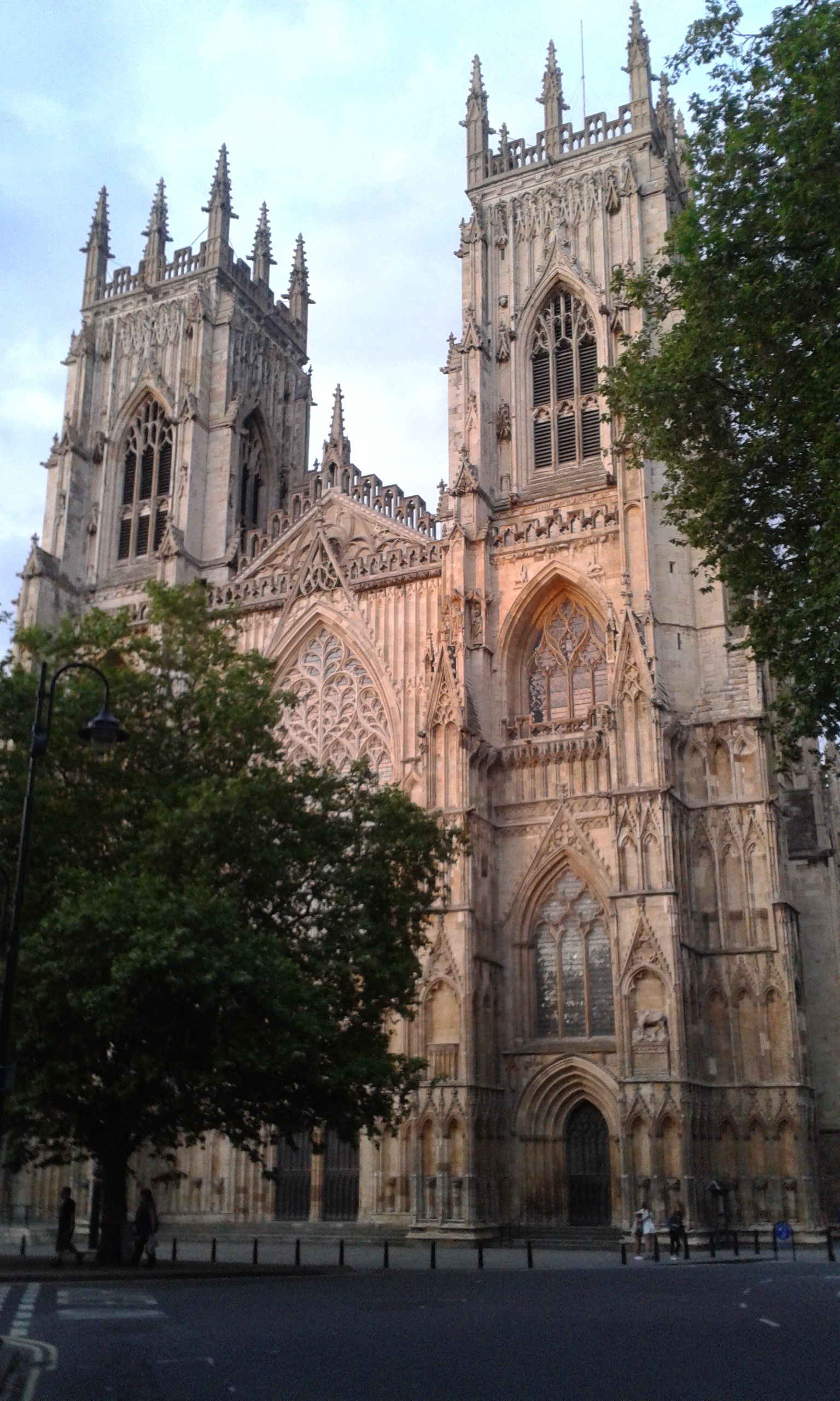 Tomé la fotografía durante mis vacaciones en esta preciosa ciudad.